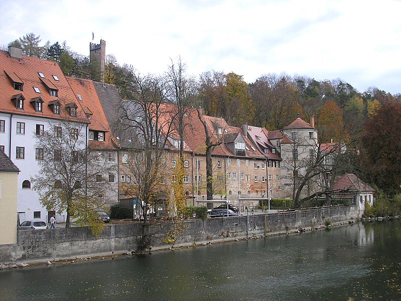 Landsberg am Lech (Oberbayern). Südwestseite der ersten Stadtmauer mit dem „Nonnenturm“ und dem „Jungfernsprung“. Eigene Aufnahme, Okt. 2006 / Landsberg am Lech (Upper Bavaria, Germany). Southwestern part of the first city wall with the “Nonnenturm” (Tower of the nuns”) and the “Jungfernsprung” watchtower (“Jump of the virgins”). Own photo, Oct. 2006.